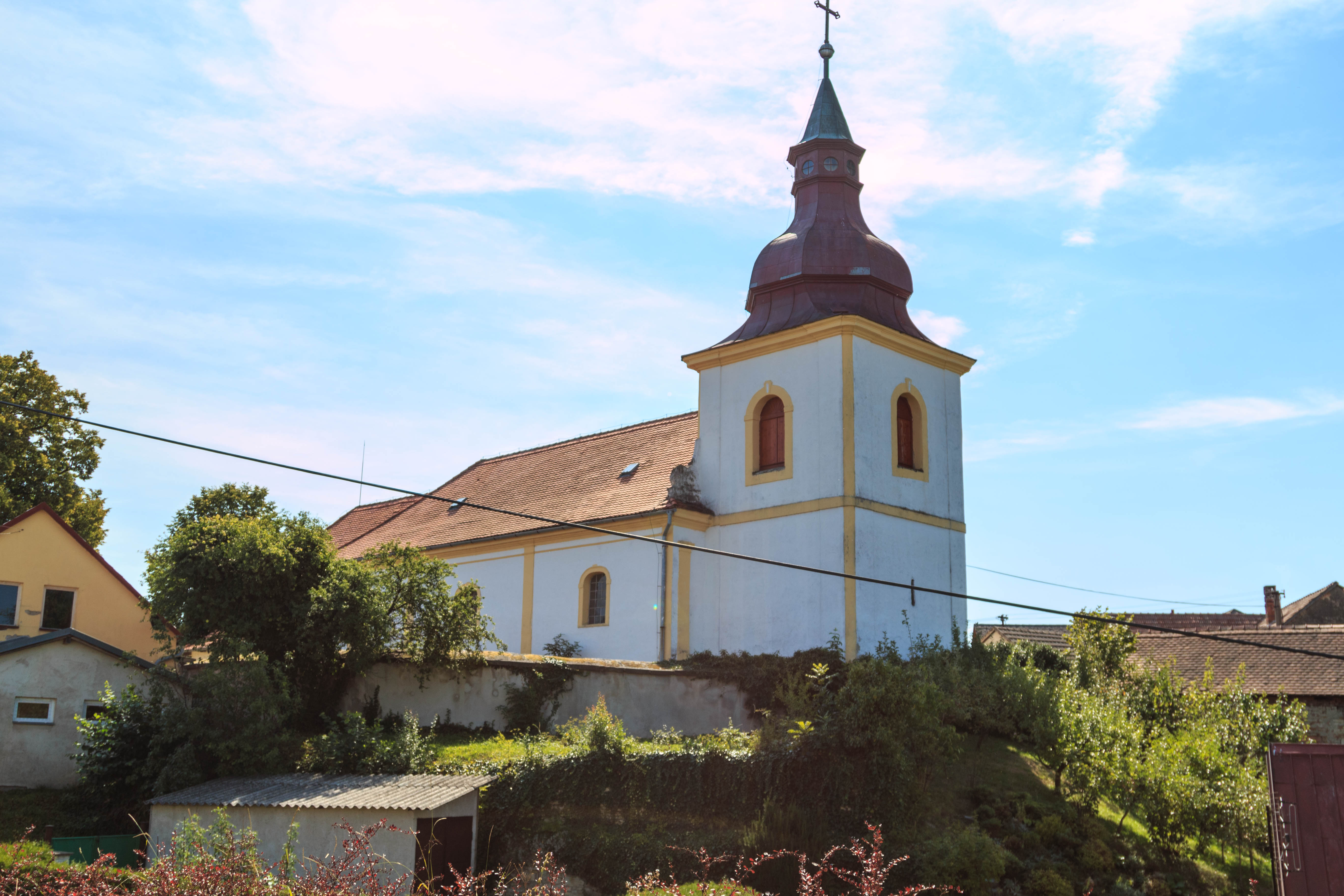 Kostel svatého Matouše, ve středu vsi, Štěpánov (Skuteč). Project: Chráněná území.